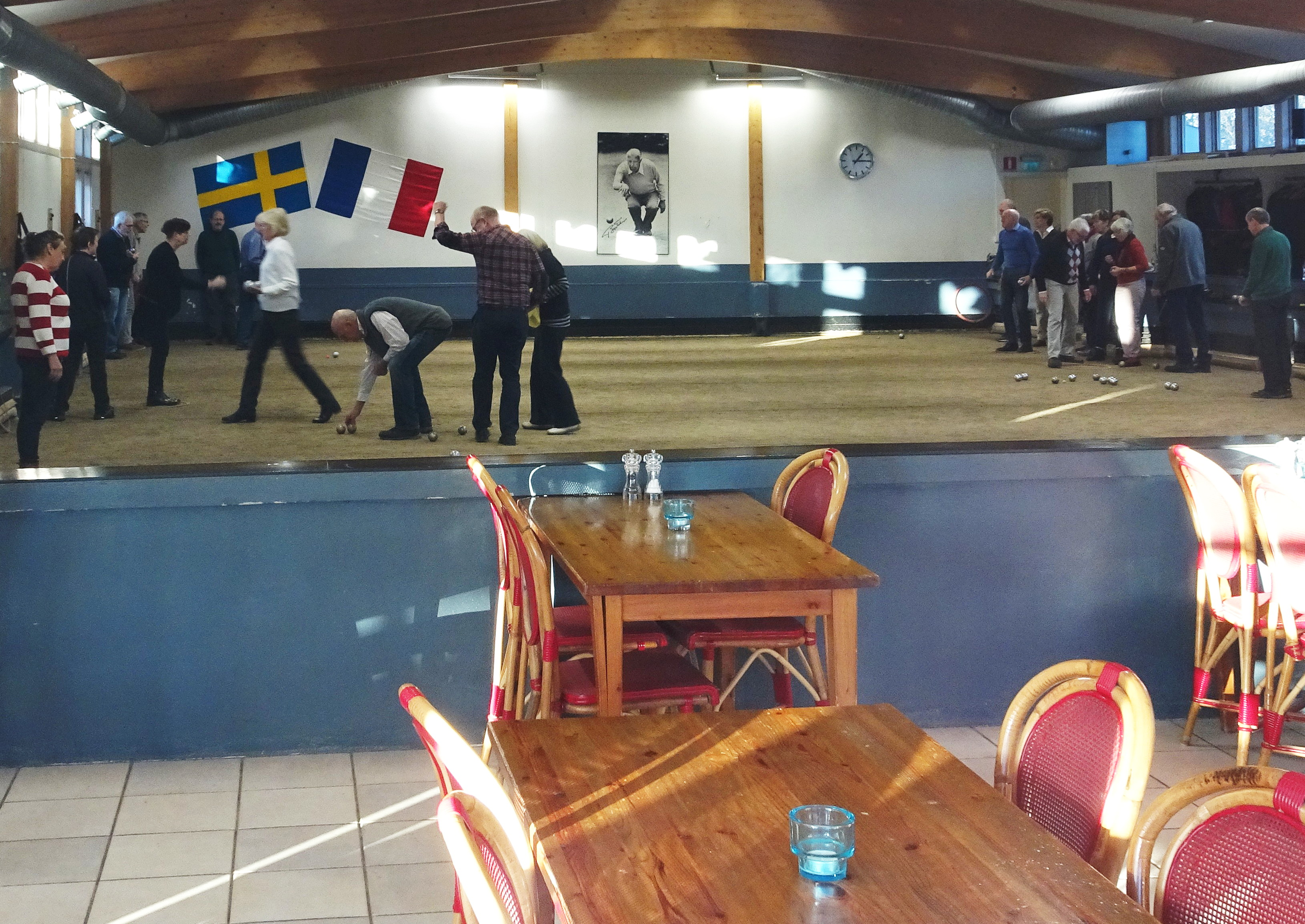 Prins Bertils Boulehall på Rosendal, Djurgården, Stockholm